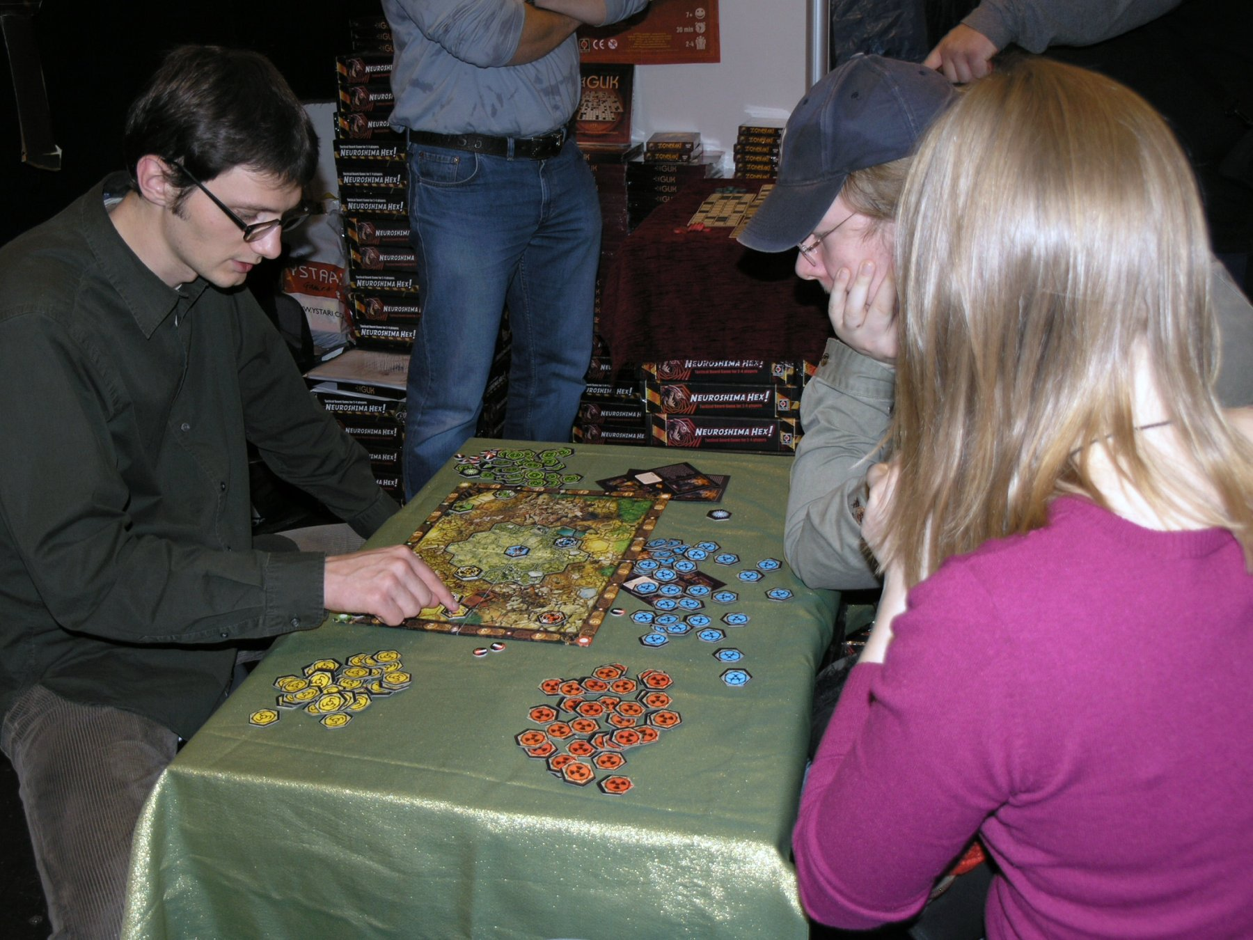 Neuroshima Hex (Essen Spiel'07)